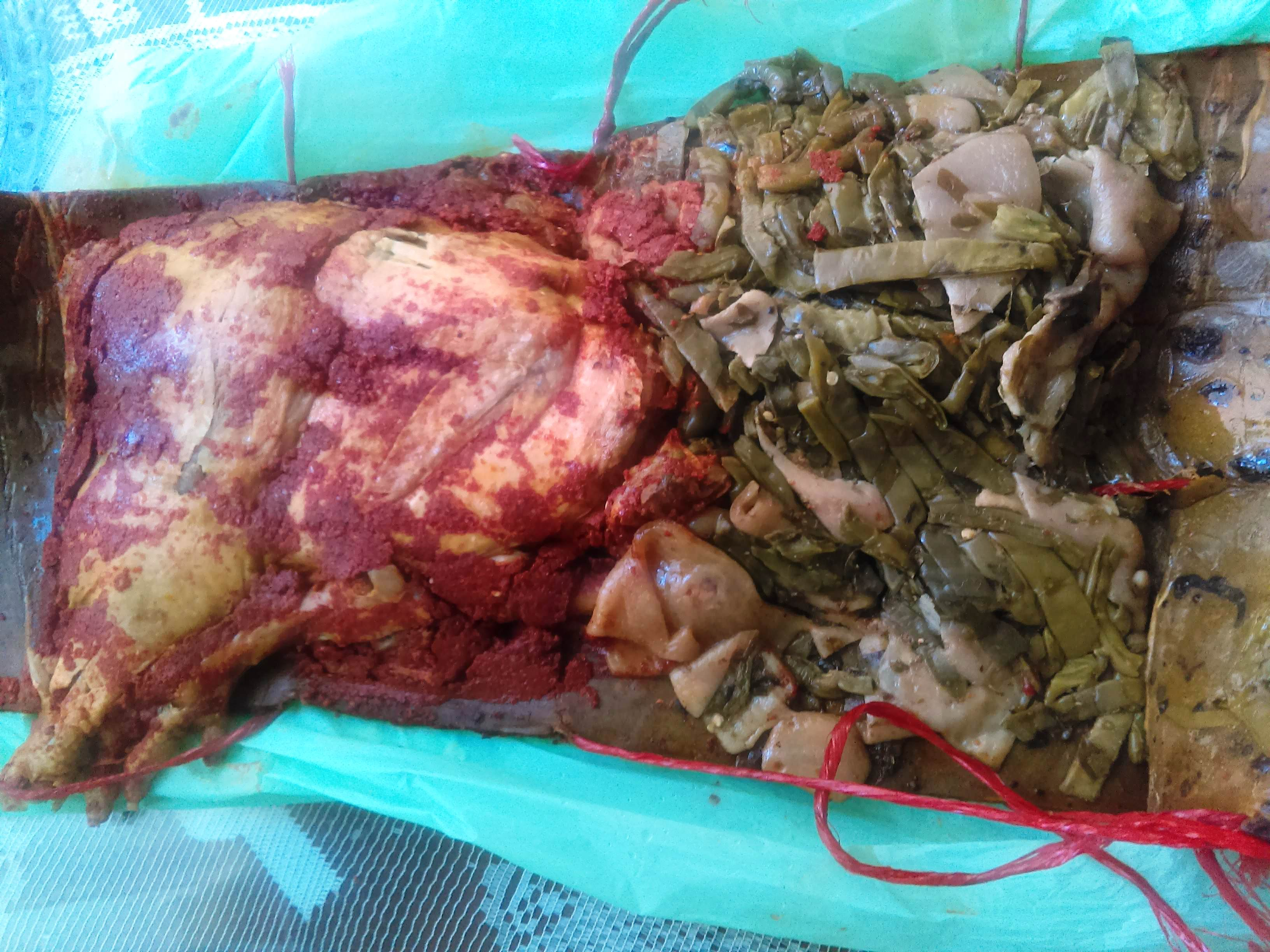 Ximbó en Actopan, Hidalgo.